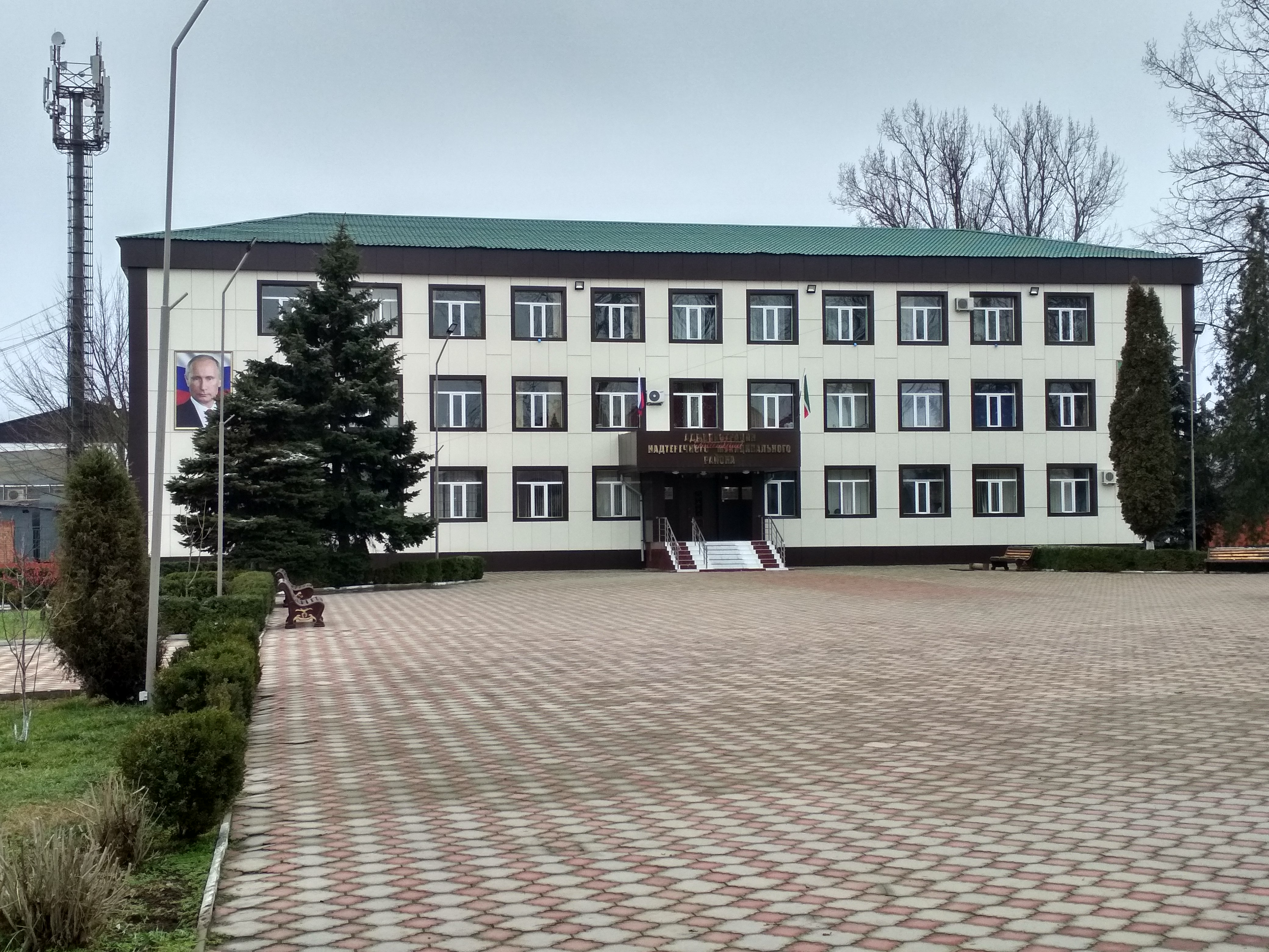 Нохчийн: Администрация Надтеречного муниципального района